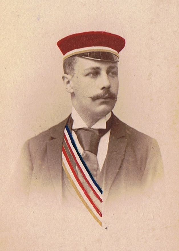 Porträtfotografie von Oskar Polano mit den Bändern der Corps Rhenania Freiburg und Starkenburgia und der Mütze der Starkenburgia